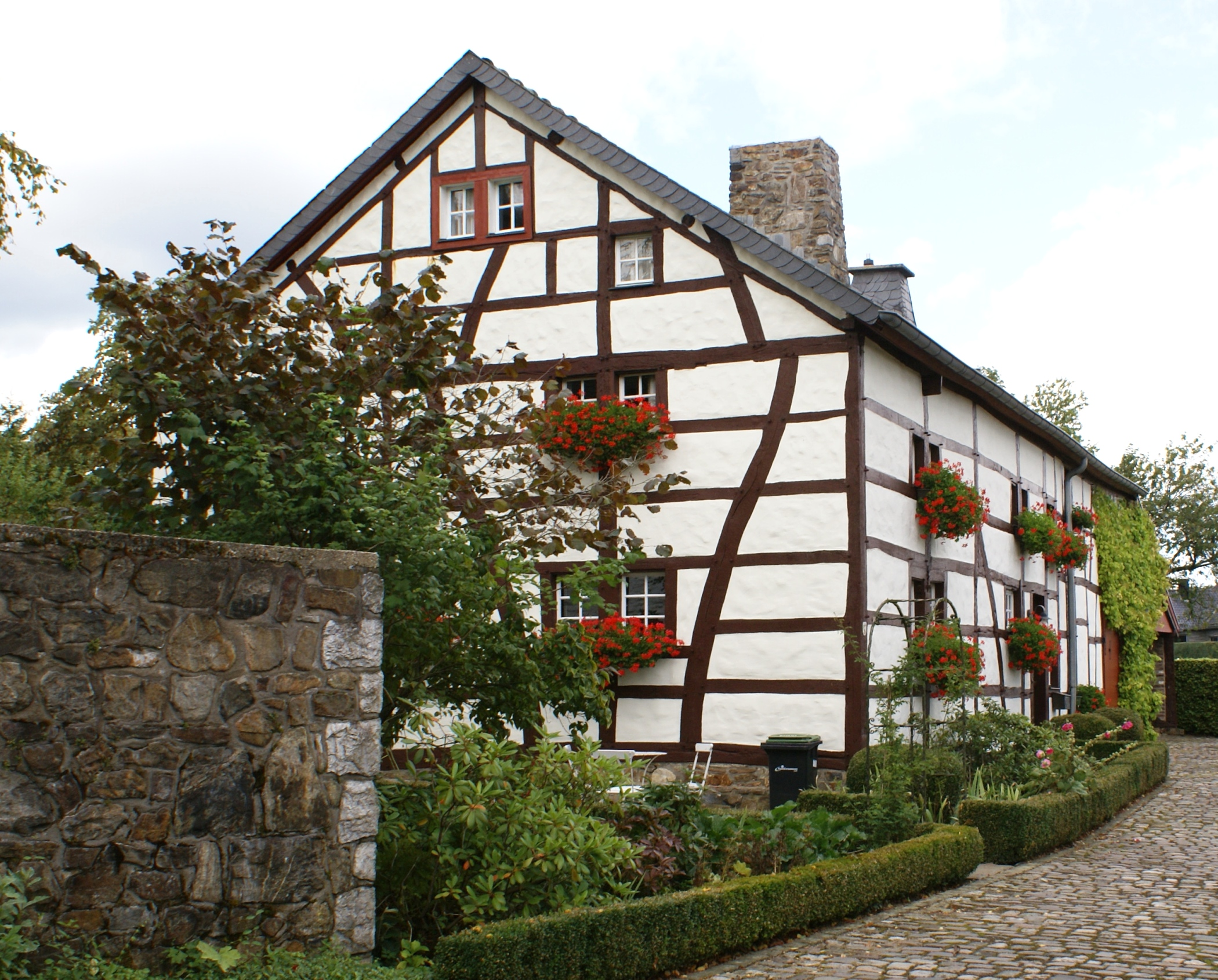 Roetgen Hauptstraße 101This is a photograph of an architectural monument., no. 51